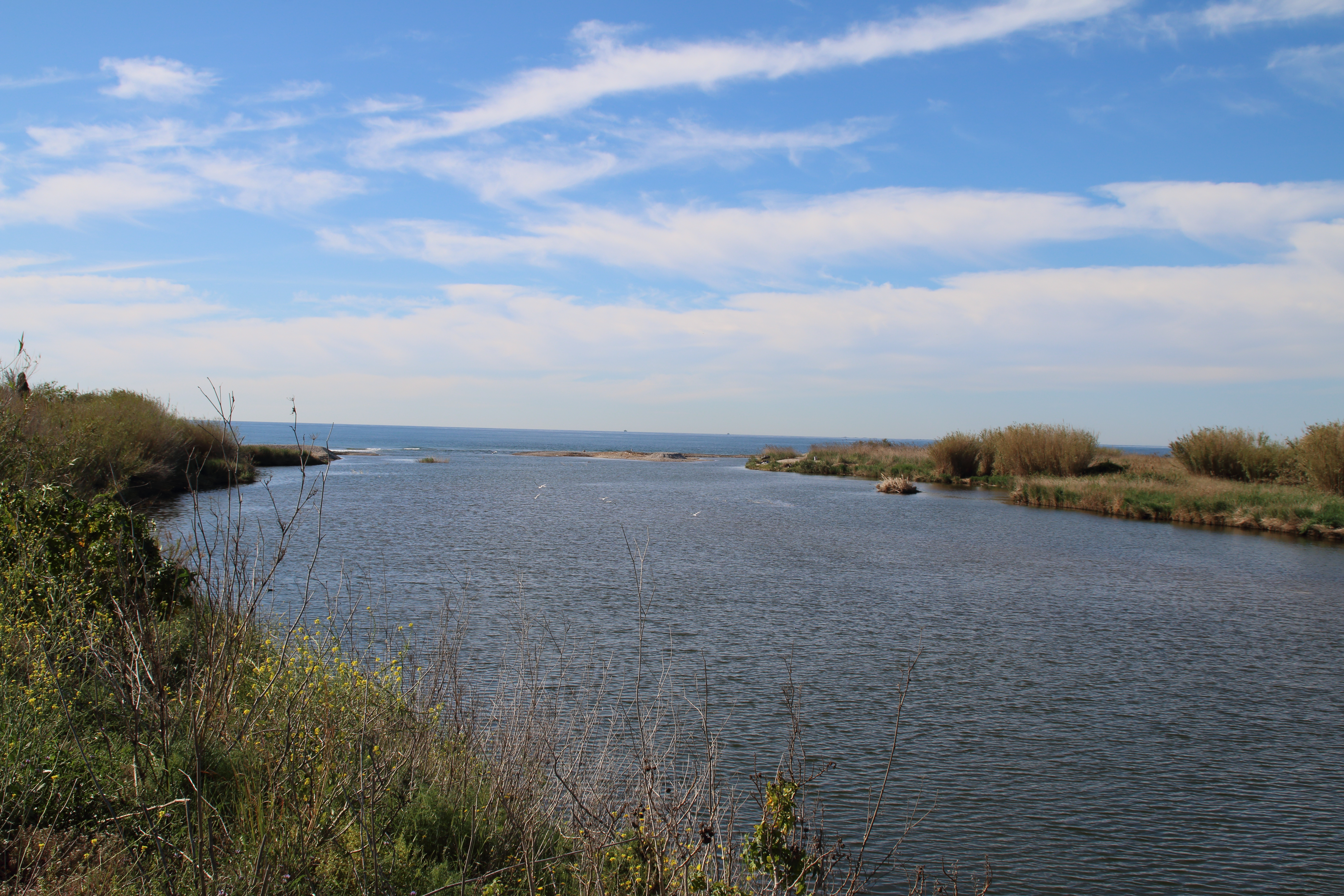 desembocadura del río Mijares This is a photography of a Special Area of Conservation in Spain with the ID: ES0000211. Natura2000 entry, EEA entry